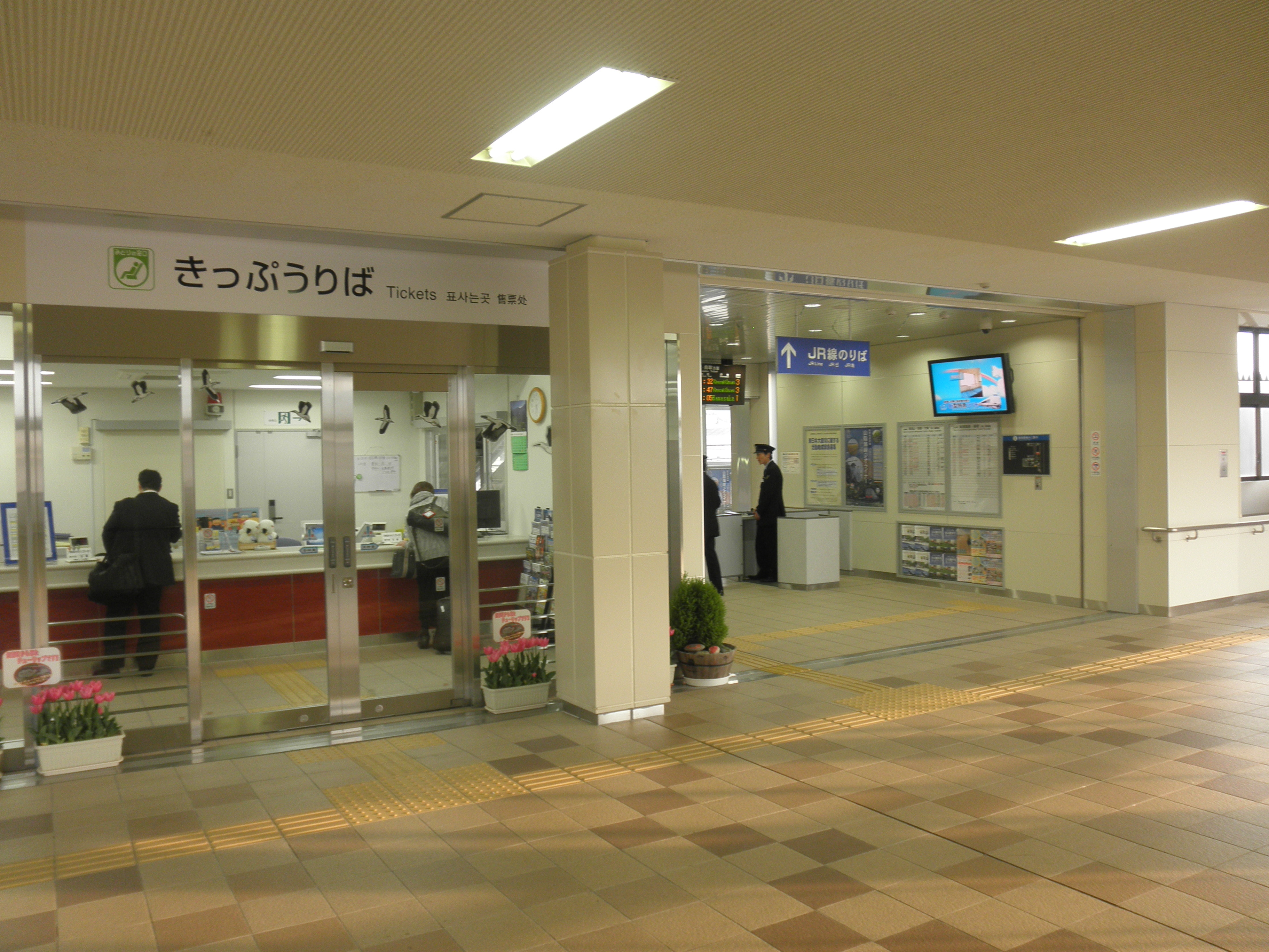 2011年2月13日より営業を開始した豊岡駅。橋上駅化され、改札口とみどりの窓口が連絡通路より入るようになった。